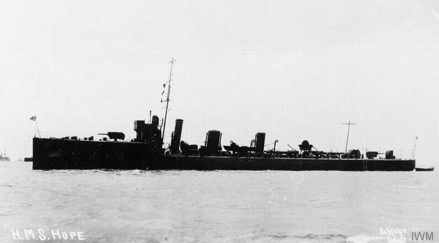 Der britische Zerstörer Hope der Acorn-Klasse